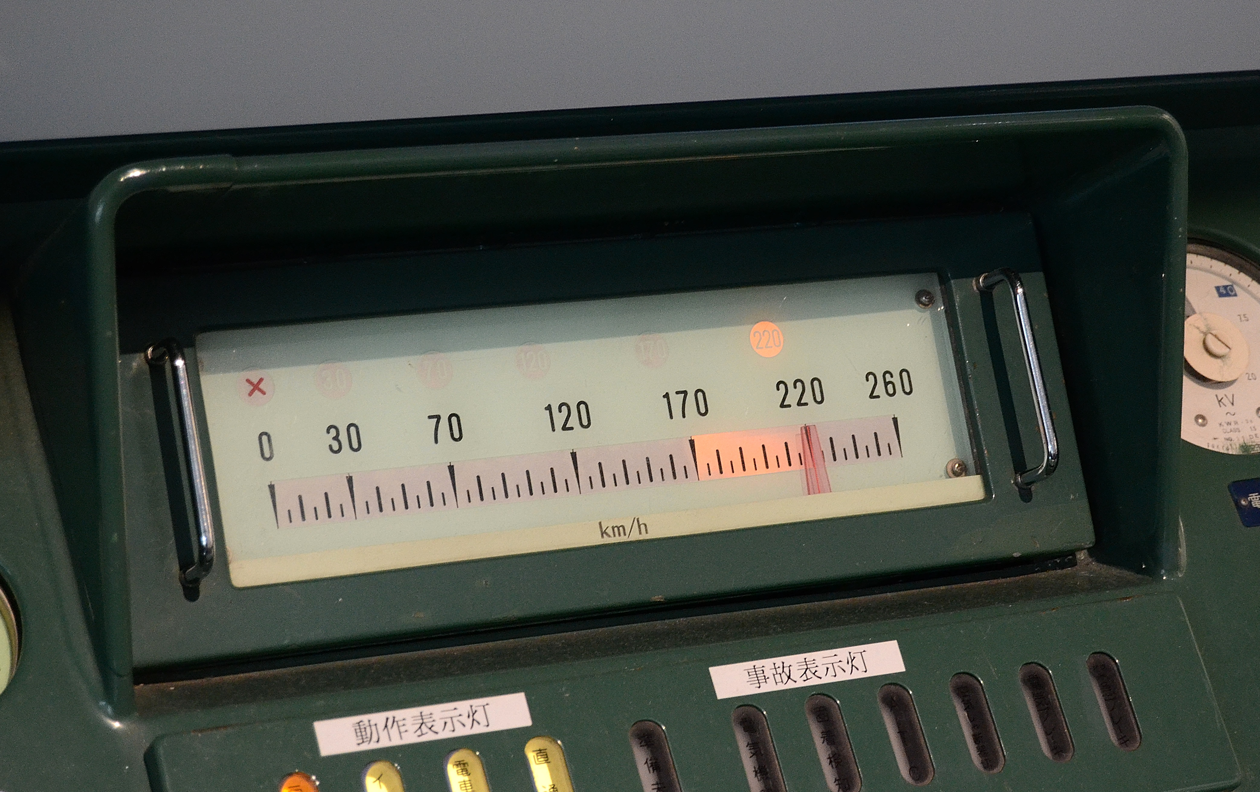 0系新幹線電車のATCの車内信号装置、速度計も兼ねる。（リニア・鉄道館で撮影）